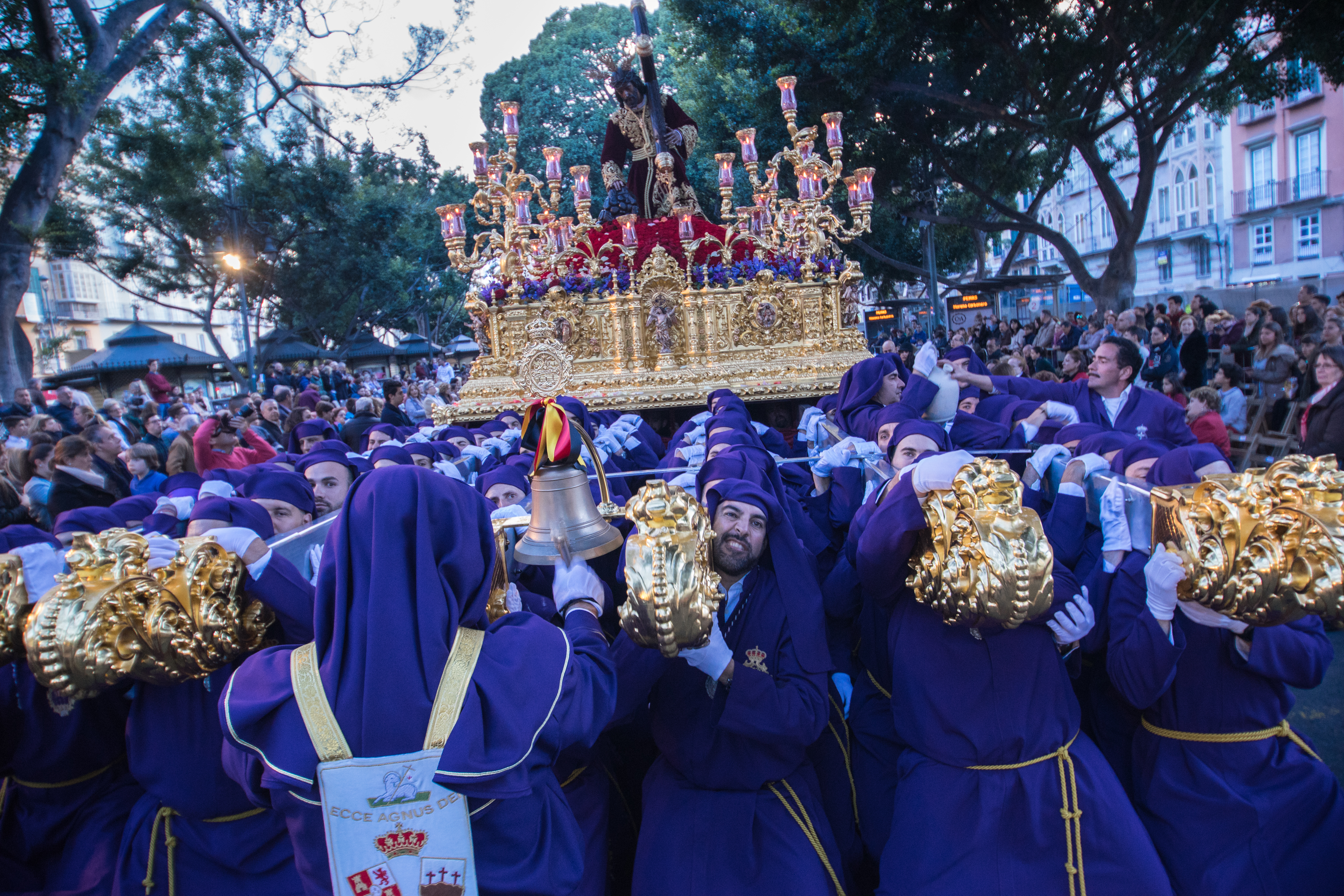 Trono del Nazareno de la Real, Ilustre y Venerable Hermandad Sacramental de Nuestro Padre Jesús Nazareno de los Pasos en el Monte Calvario y María Santísima del Rocío This is a photography of a Folklore festival in Spain (Wikidata id Q9075883).